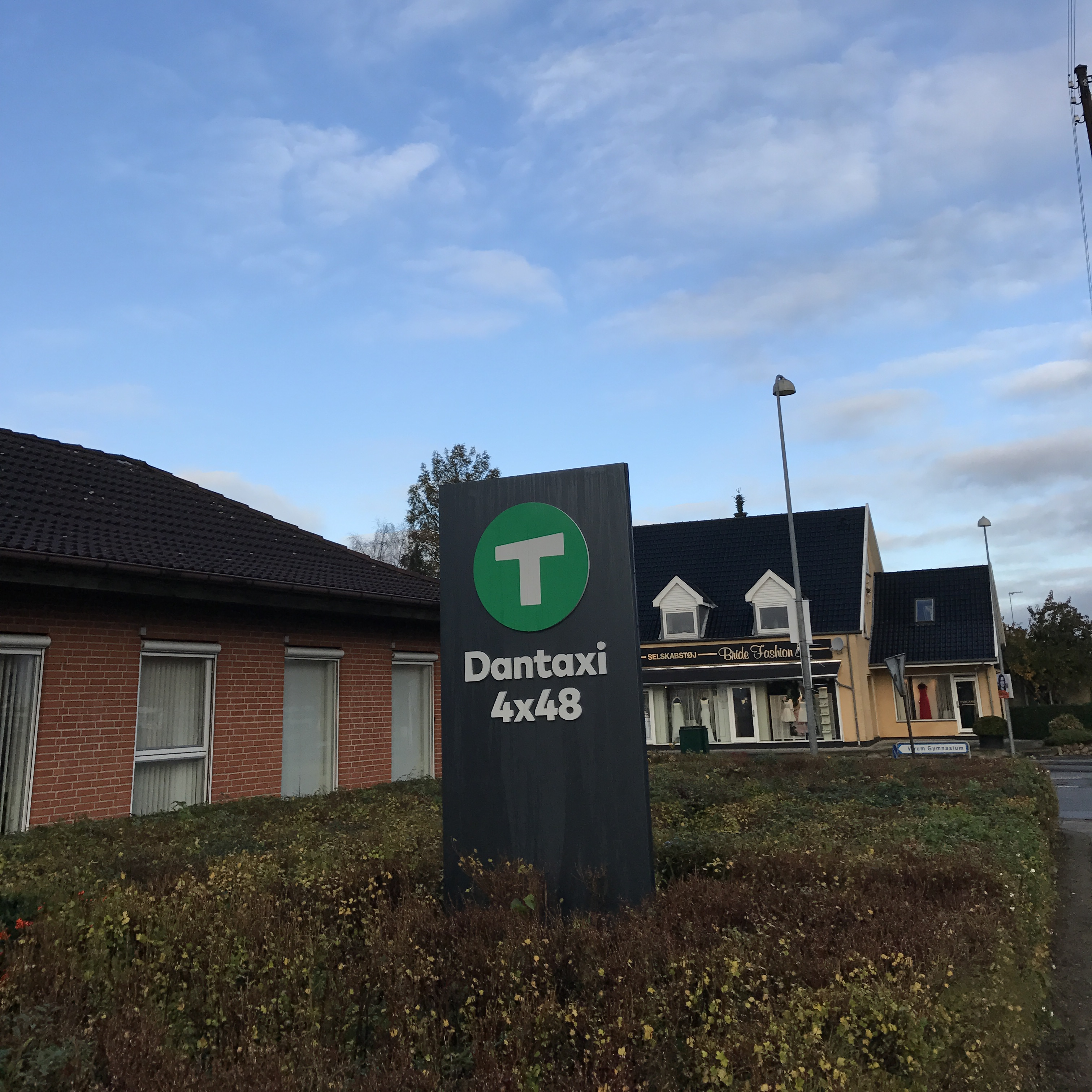 Dantaxi 4x48's hovedkontor. Beliggende på Kongevejen 135 i Virum.